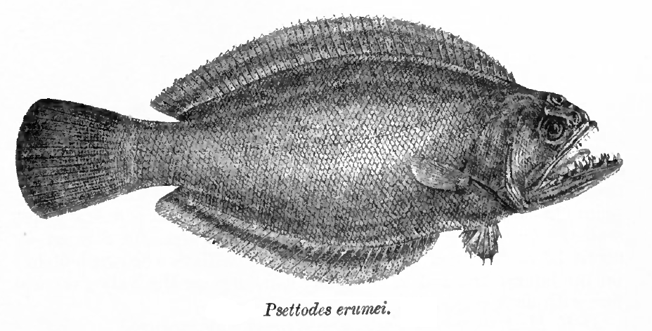 Psettodes erumei (Bloch & Schneider, 1801)